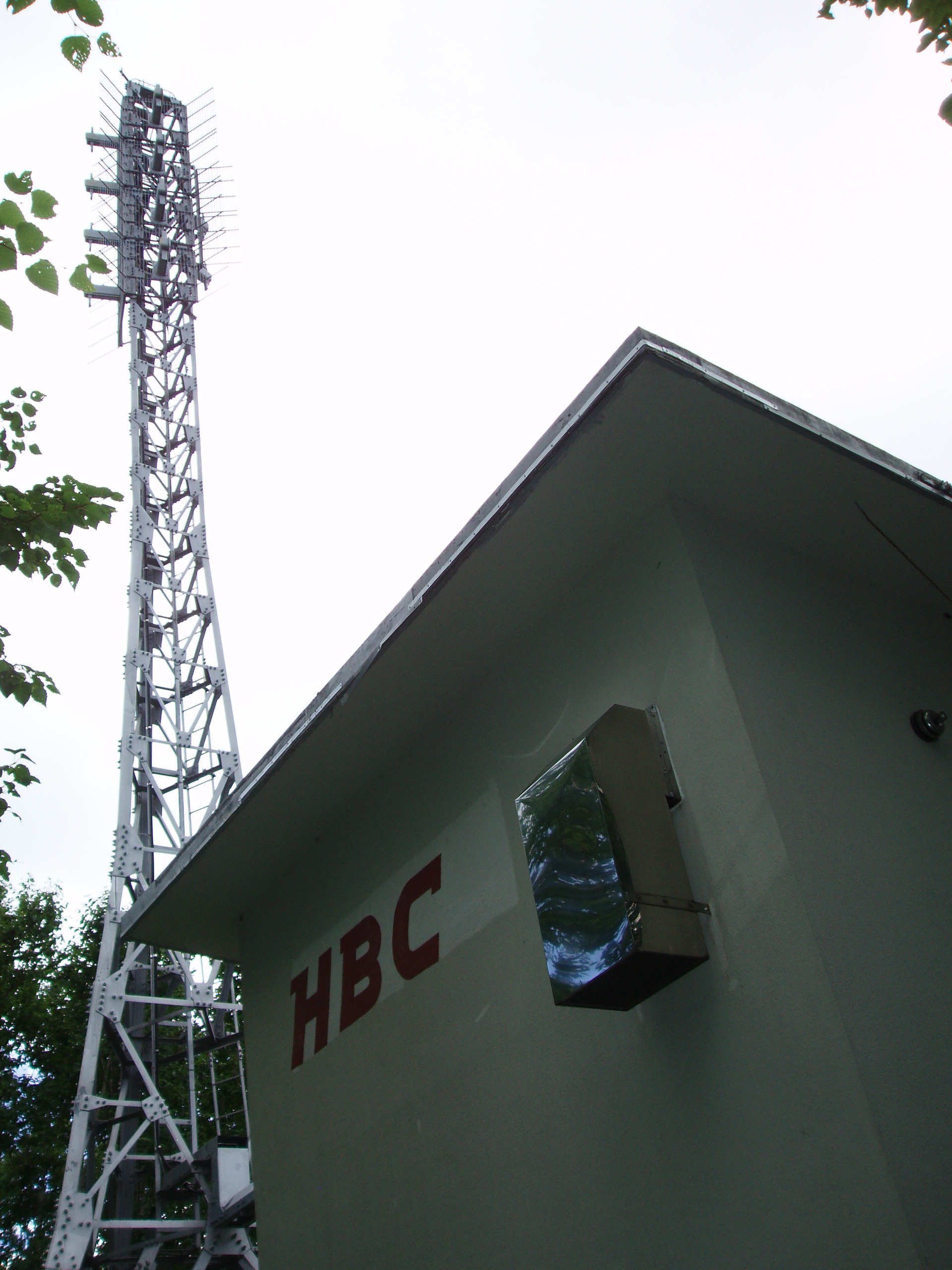 枝幸中継局 HBC送信設備